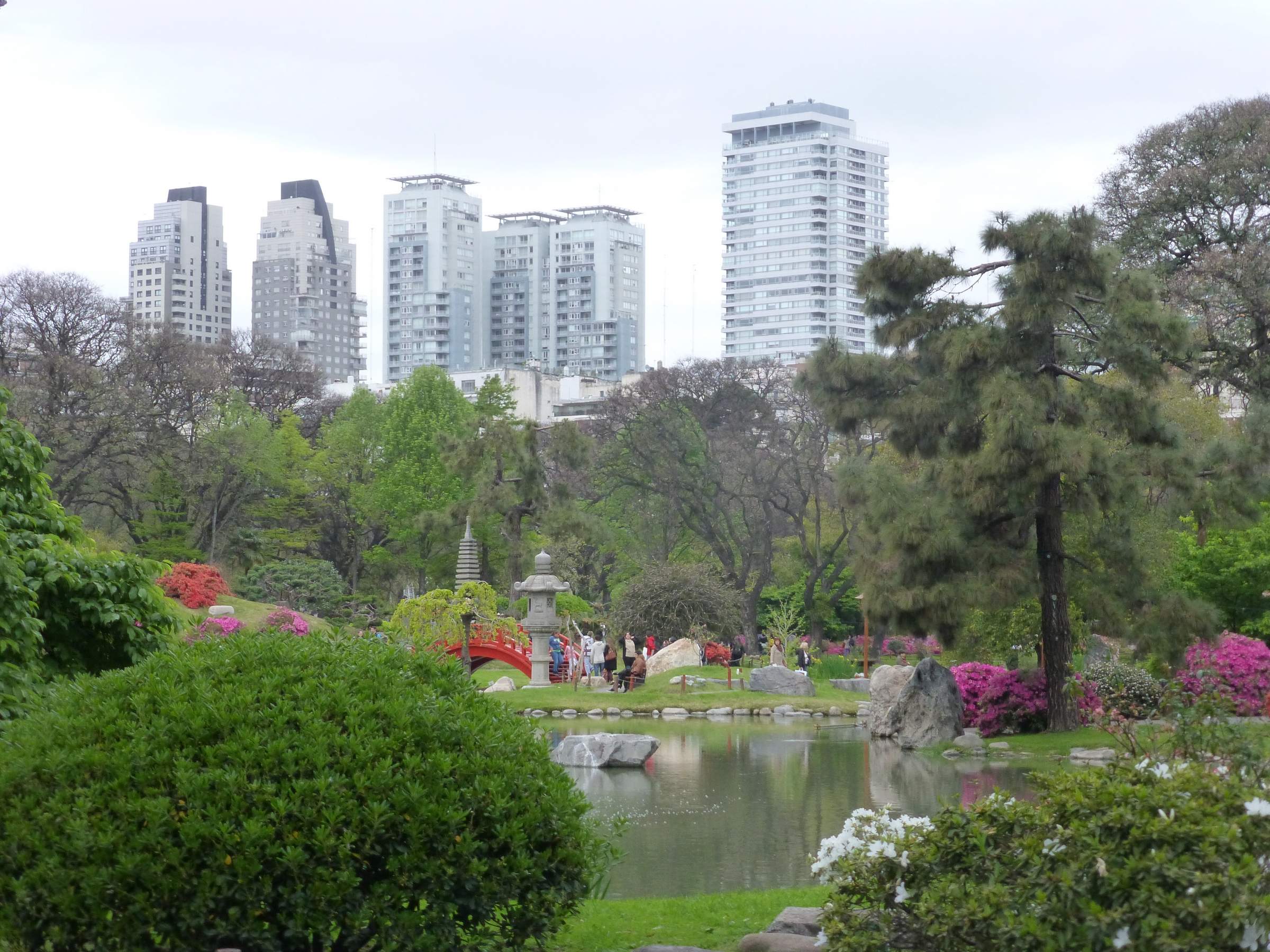 Buenos AIres Japanese Garden (Jardín Japonés). Visible in the background are (from left) the Bulnes and Ruggieri Towers (1997), the Las Plazas Complex (1997), and the Bellini Tower (2007).